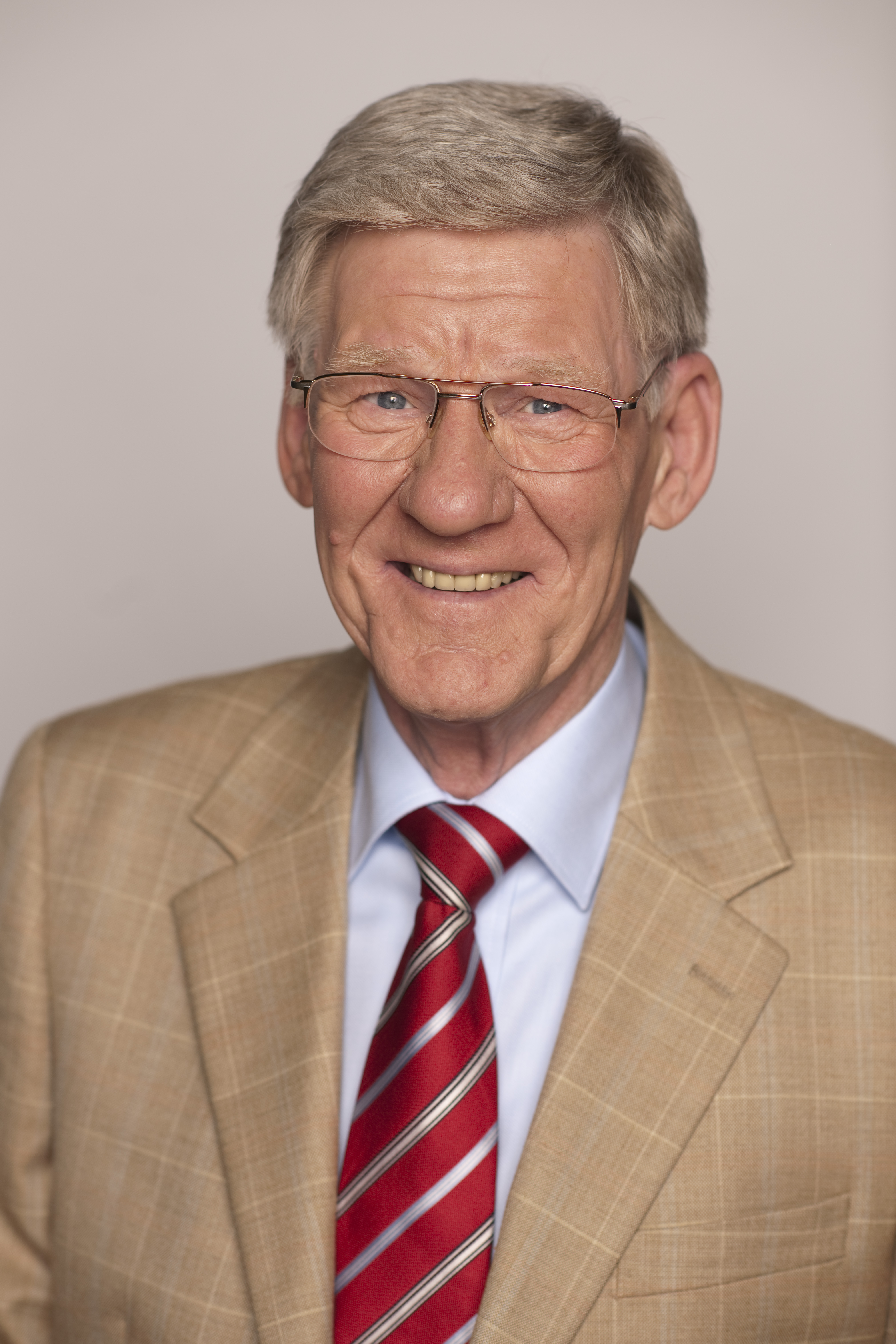 Kandidat für den Deutschen Bundestag - Volker Blumentritt (SPD)